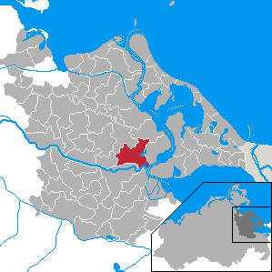 Murchin, Landkreis Ostvorpommern, Mecklenburg-Vorpommern